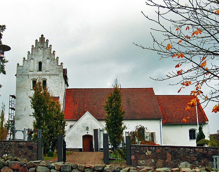 fra syd